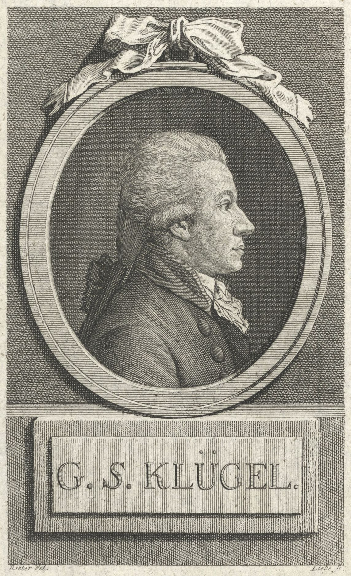 Porträt: Georg Simon Klügel. In: Allgemeine Deutsche Bibliothek. 92. Band, erstes Stück, Nicolai, Berlin und Stettin 1790